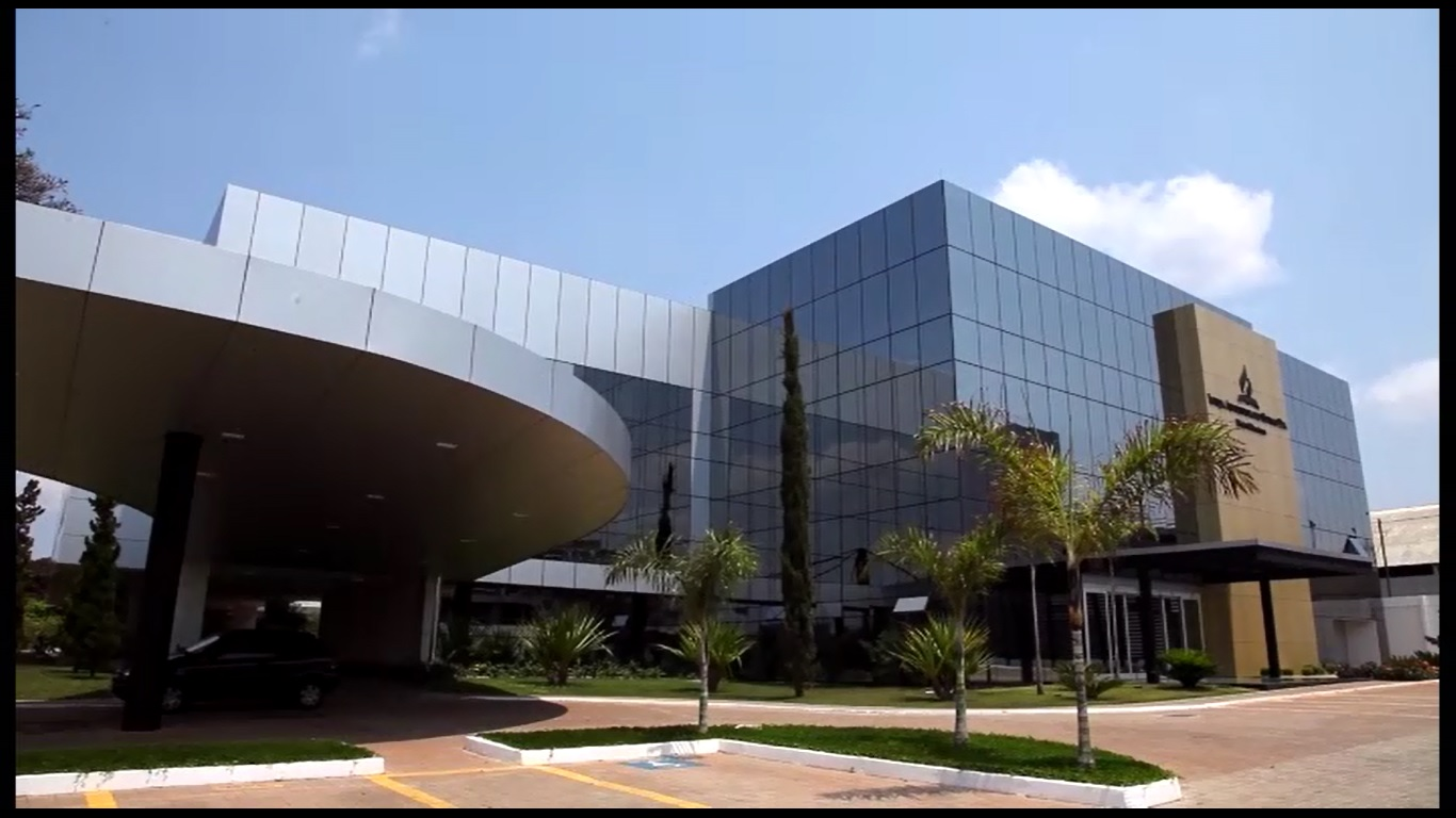 Fachada da Divisão Sul Americana da IASD